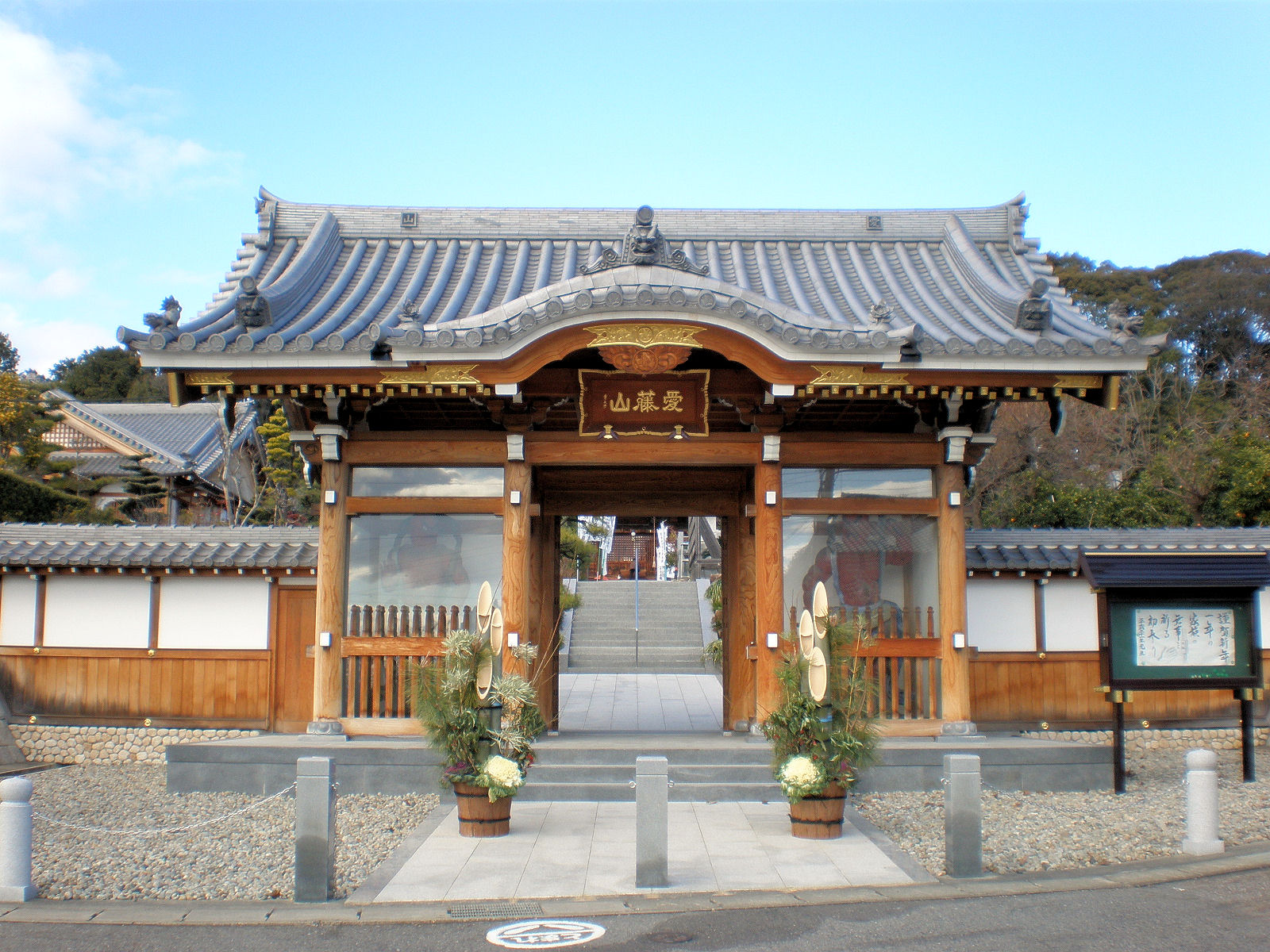 愛知県小牧市にある小松寺の山門